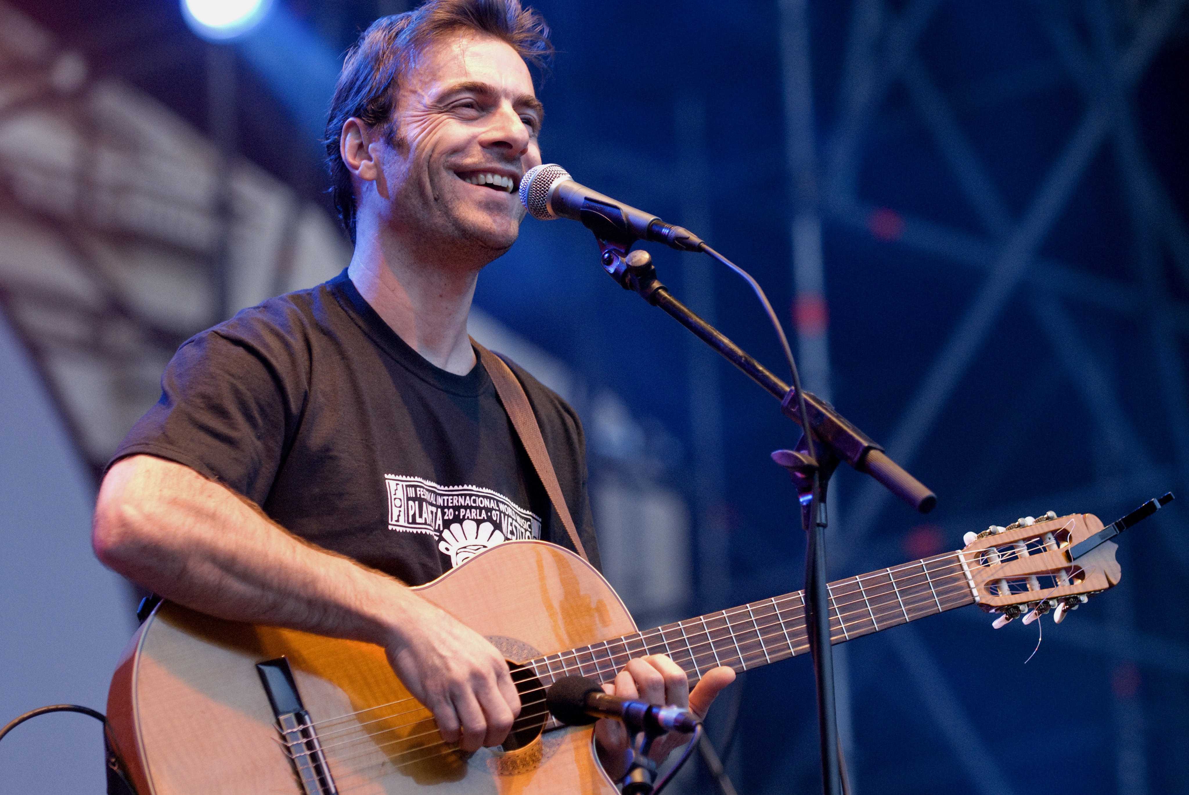 Kevin Johansen